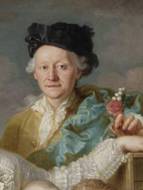 Peintre anonyme, portrait du marchand de soie Franz Maria Schweitzer